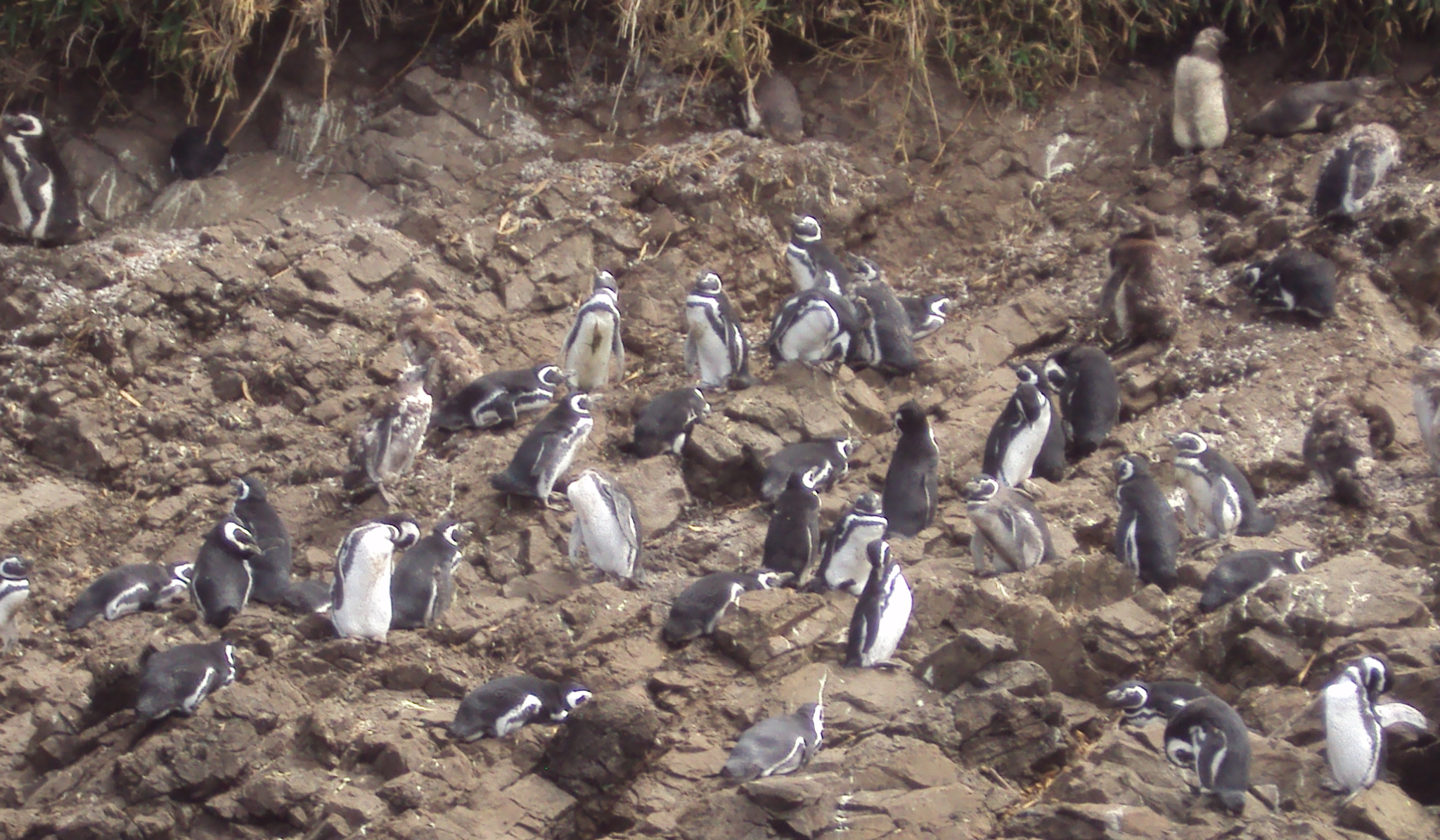 Pinguineras en Islotes de Puñihuil.